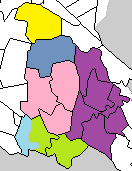 群馬県新田郡。